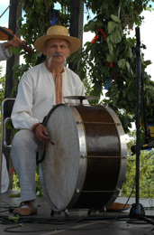 Василь Бут на Країні мрій-2006